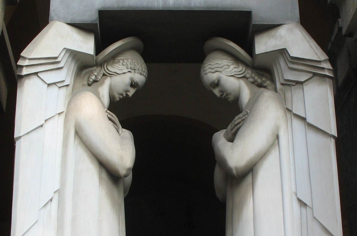 Statue Art Déco di angeli nel Cimitero monumentale di Staglieno, Genova.